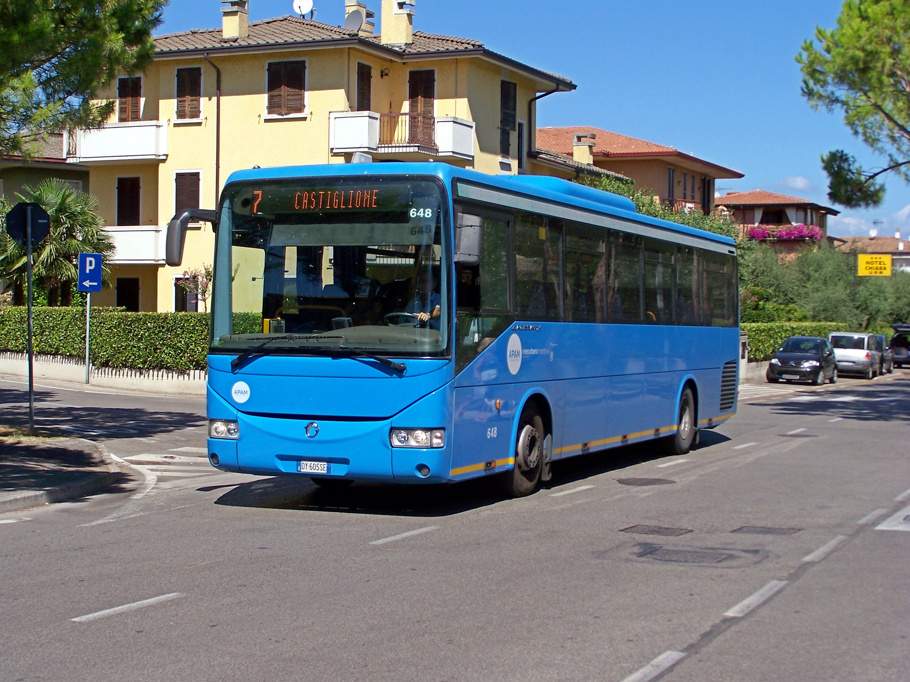 L'Irisbus Crossway nr. 648 di APAM Esercizio ritratto in via Roma a Sirmione, mentre espleta il servizio Sirmione-Castiglione